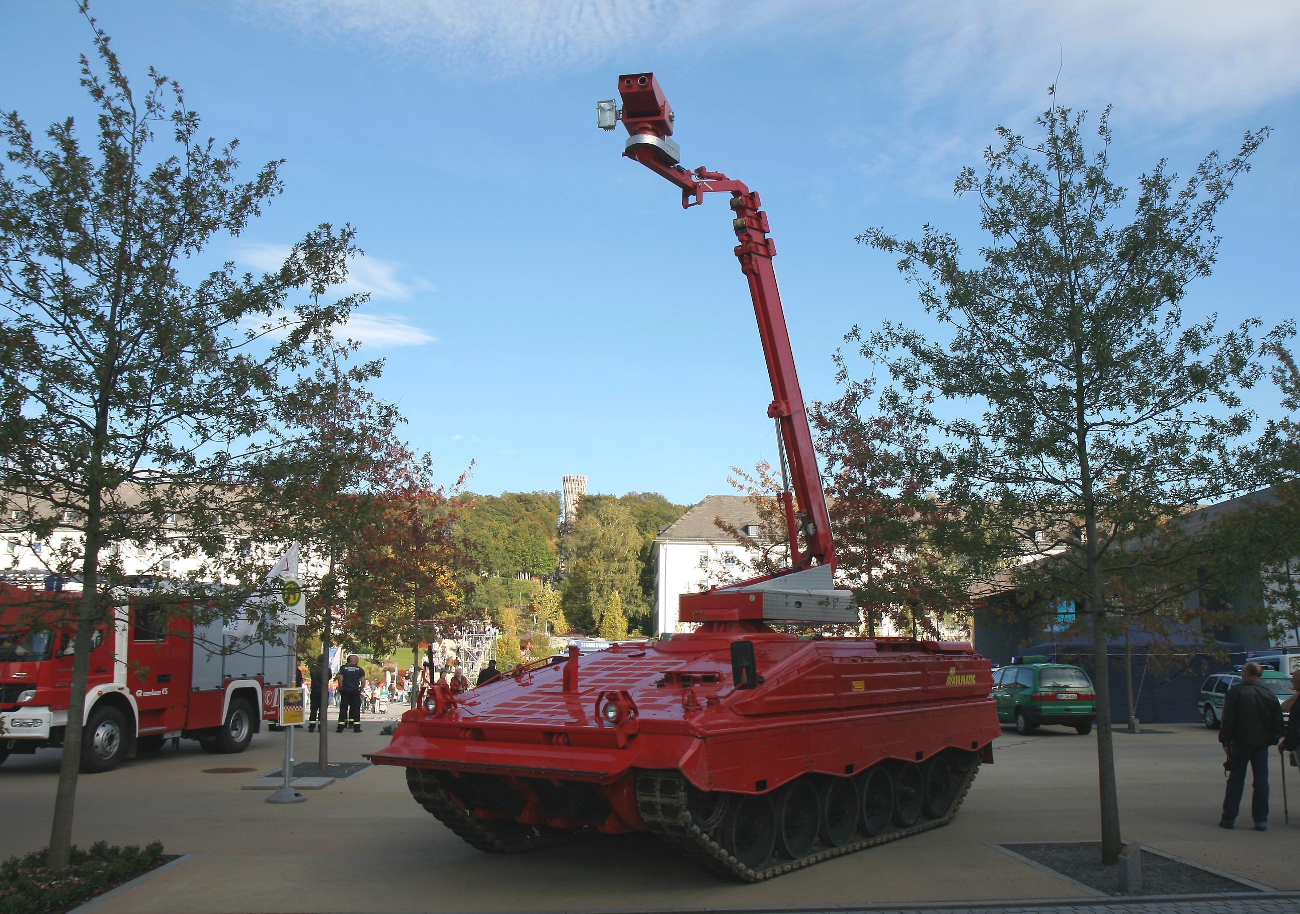 Löschpanzer der Firma Airmatic auf dem Gelände der Landesgartenschau Hemer bei den Hemeraner Sicherheitstagen.